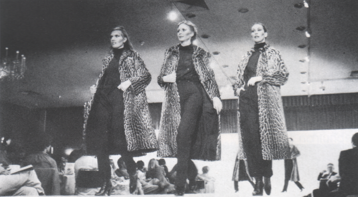 Pelzmodenschau zur Frankfurter Nachmusterung 1978 im Ballsaal des Hotels Frankfurt Intercontinental, Frankfurt am Main. Inszenierung Team Fashion Lights, Helmut Lang, Berlin.